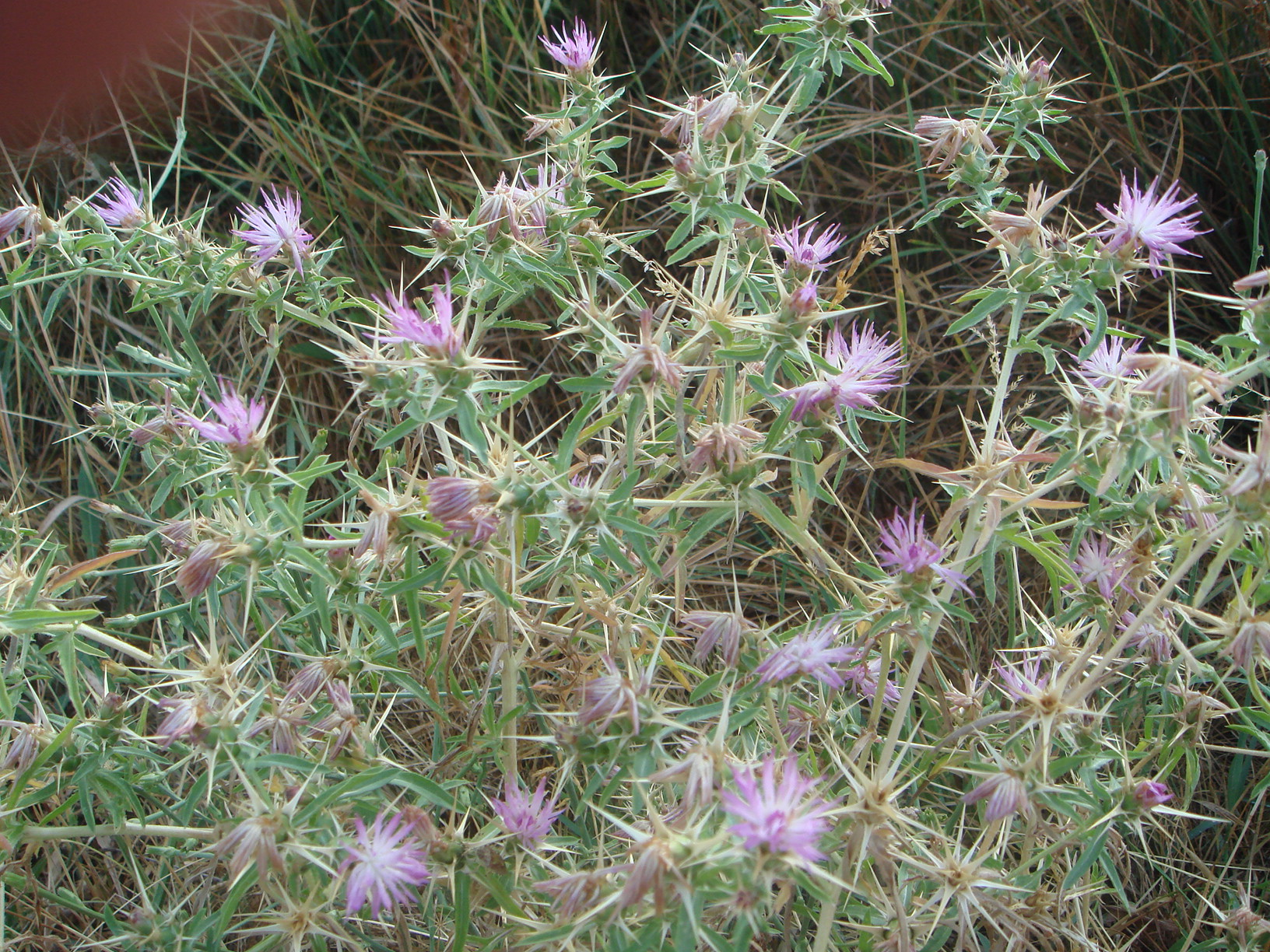 Cardo estrellado (Centaurea calcitrapa), La Torre (Ávila), España